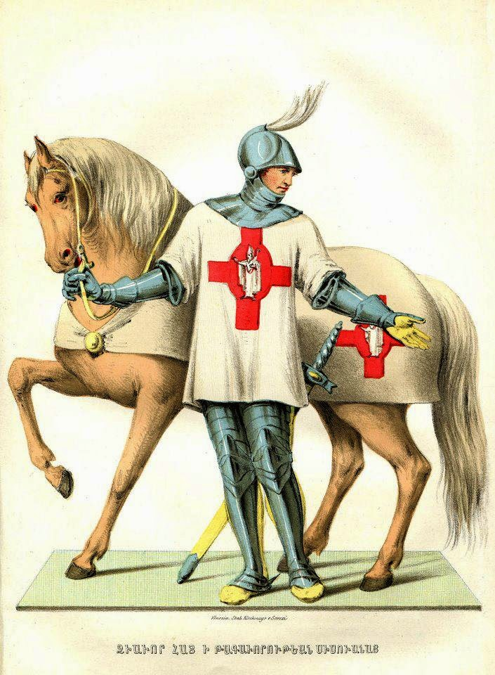 ՁԻԱՒՈՐ ՀԱՅ Ի ԹԱԳԱՒՈՐՈՒԹԵԱՆ ՍԻՍՈՒԱՆԱՅ Հայ Ձիավոր Կիլիկիո Հայոց թագավորությունից: Հ. Ղևոնդ Ալիշան, «Սիսուան»